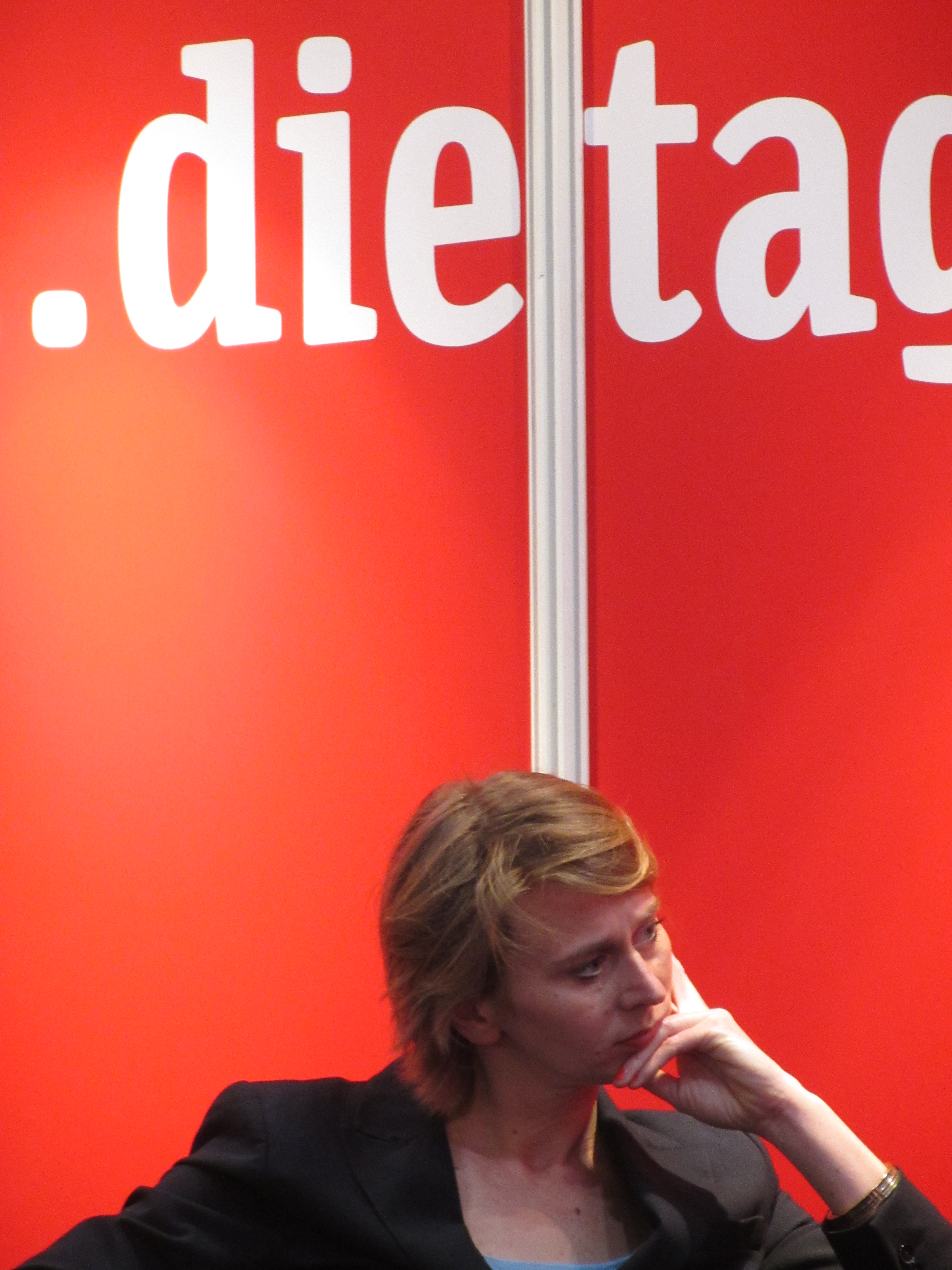 Doris Akrap auf der Leipziger Buchmesse 2014 / taz.studio / Die taz liest / Tag 3 – 15.03.2014 / 11:00 Uhr / Taksim ist überall. / Die Gezi-Bewegung und die Zukunft der Türkei / Deniz Yücel, Doris Akrap